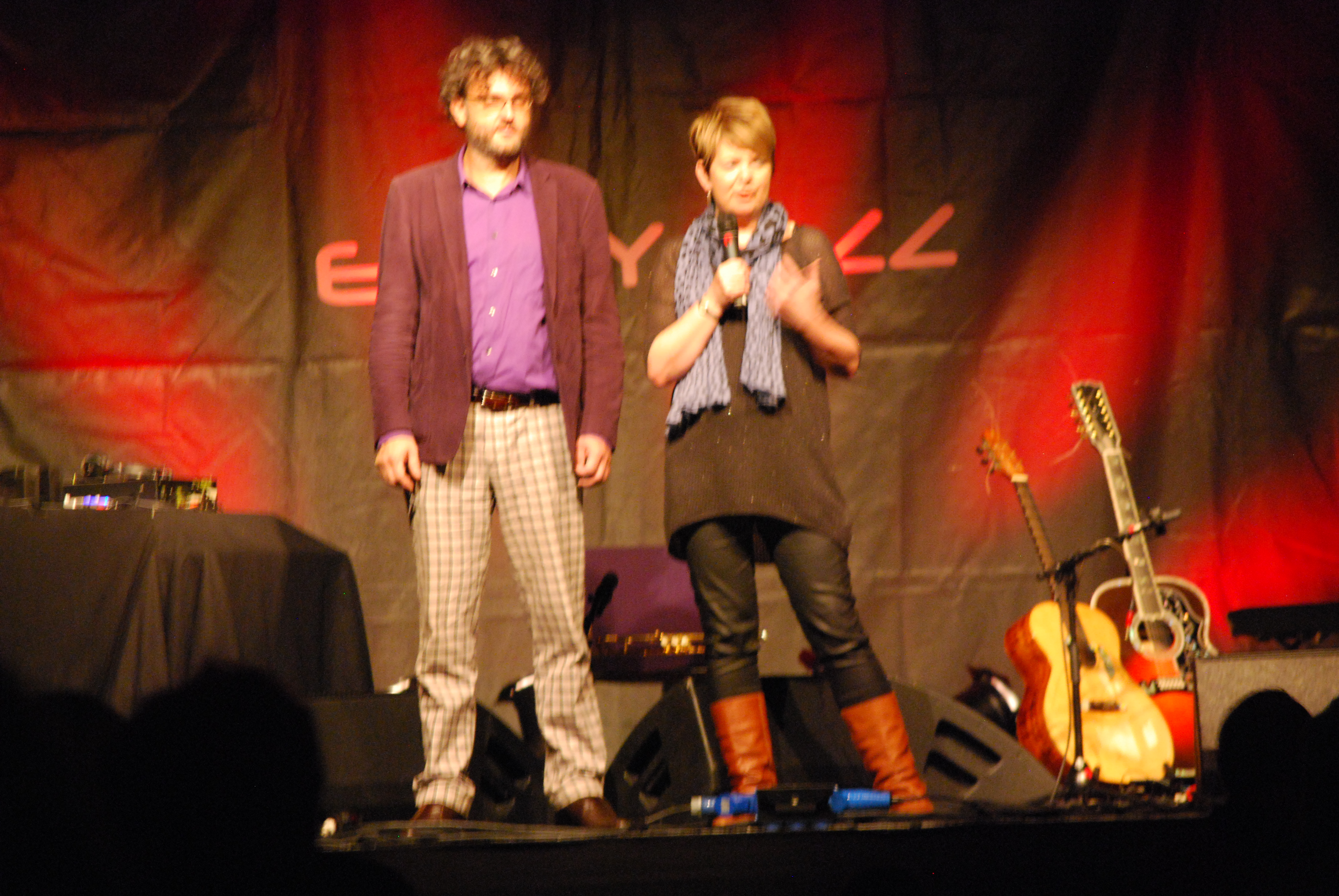 Enjoy Jazz, Festival 2013; Festivalleiter Rainer Kern mit BBC3 Mitarbeiterin Fiona Talkington